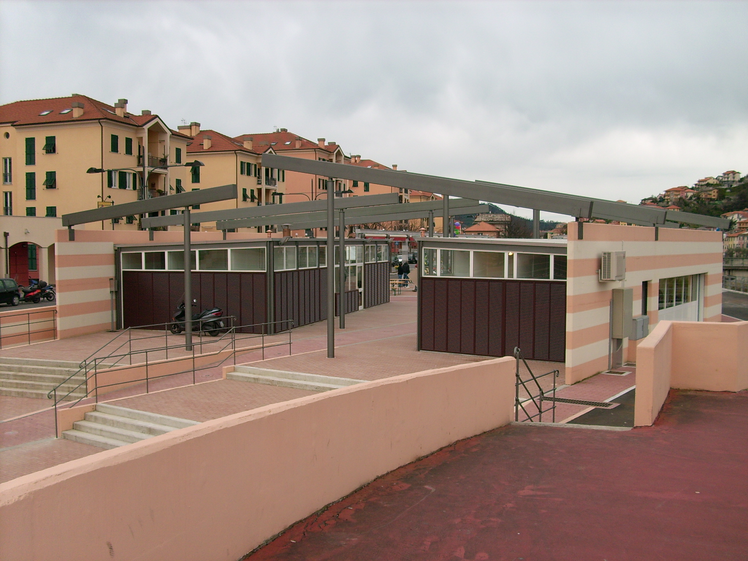 Piazza Unicef di Casarza Ligure, Liguria, Italia